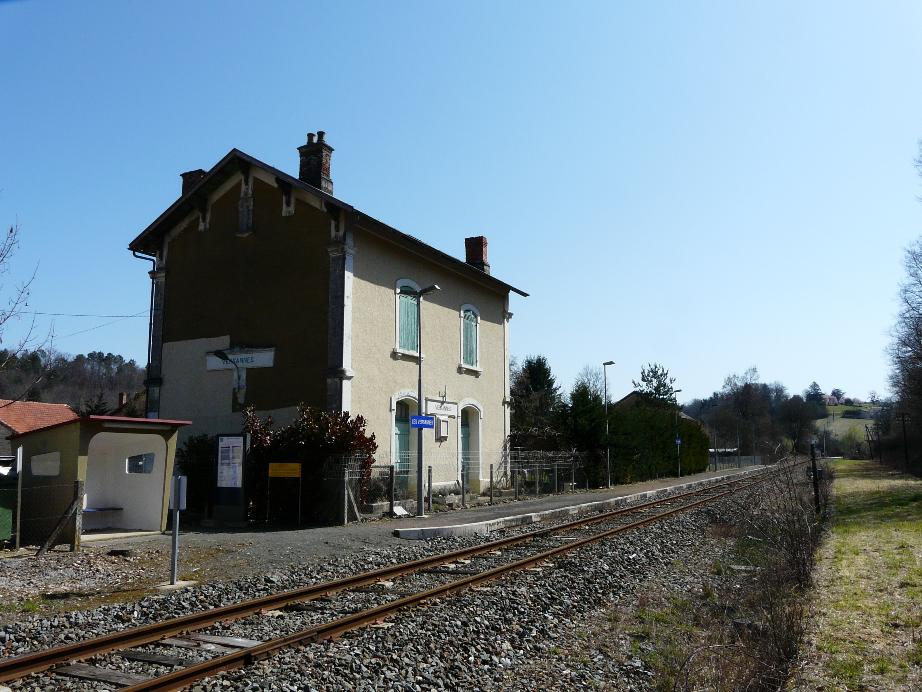 La gare des Versannes, La Douze, Dordogne, France.